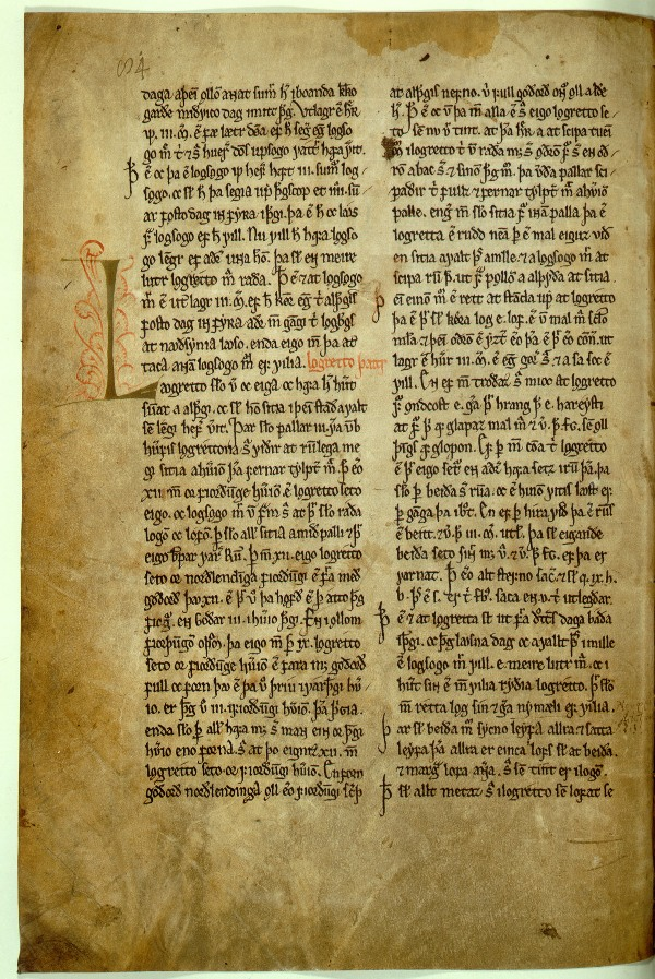 Gragas GKS 1157 fol, s. 84, sp. B